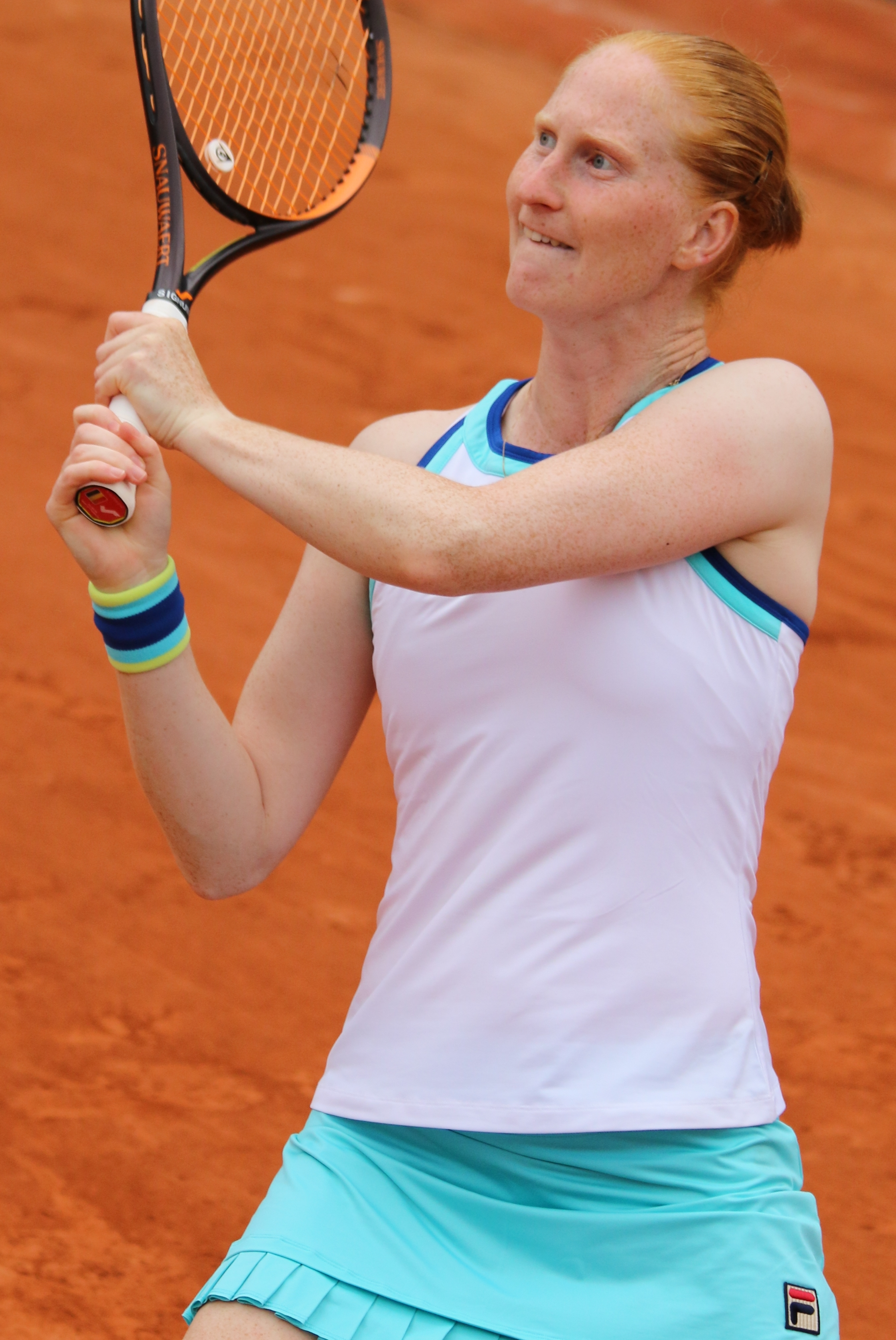 van Uytvanck RG19 (4)